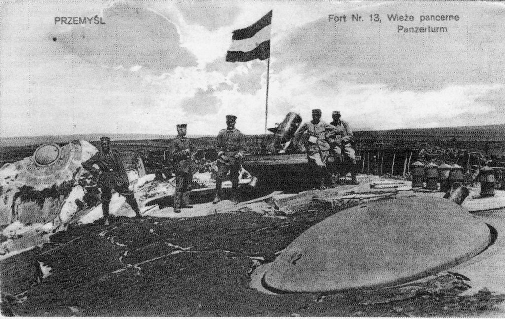 Wysadzone wieże pancerne dla haubic na stropodachu fortu XIII "San Rideau".